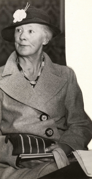 portrett, kvinne, forfatter, lektor, sittende halvfigur.